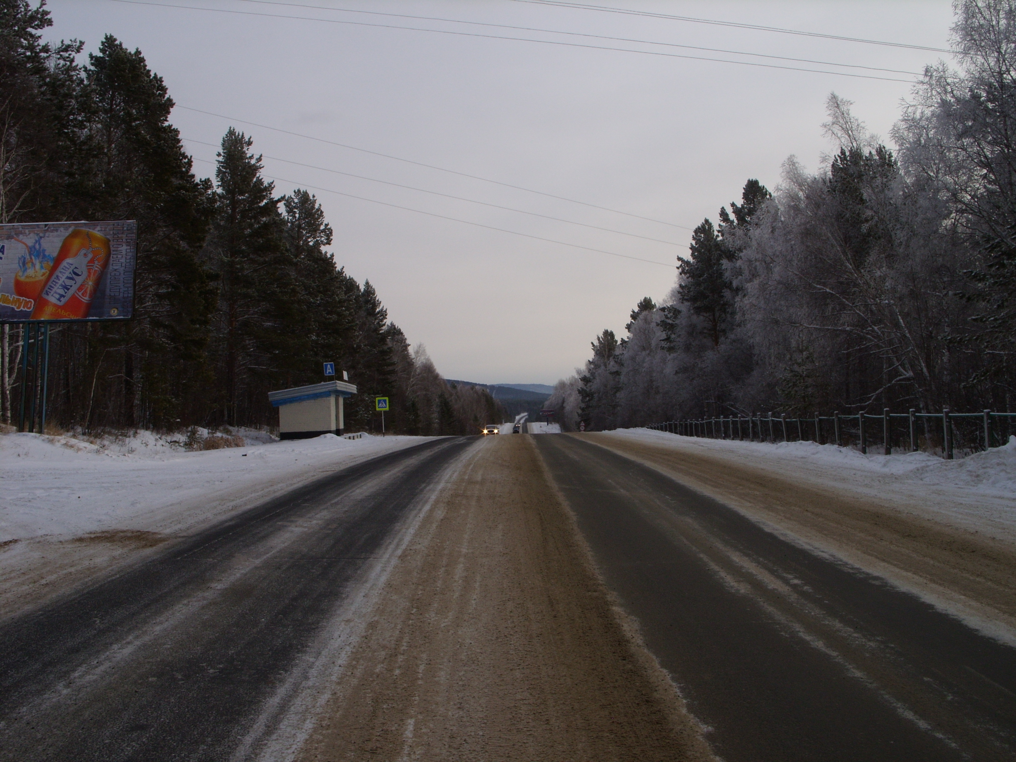 неподалёку от музея "Тальцы", Иркутская область, Россия